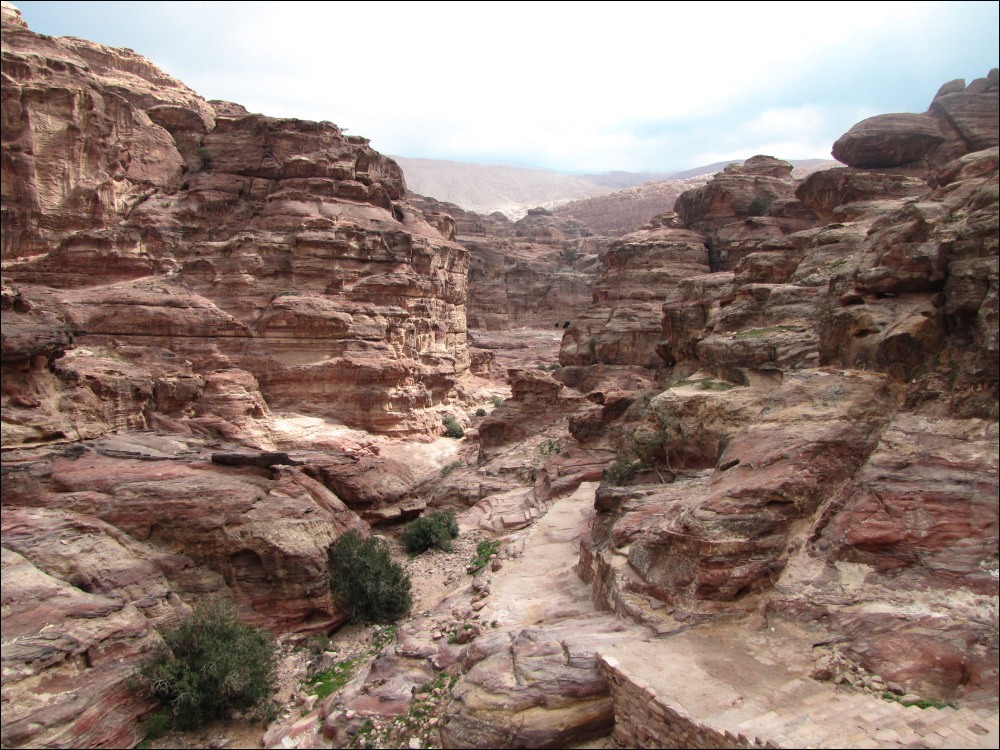 Le wadi Siyyah sur une partie de son parcours en sortie de Pétra.